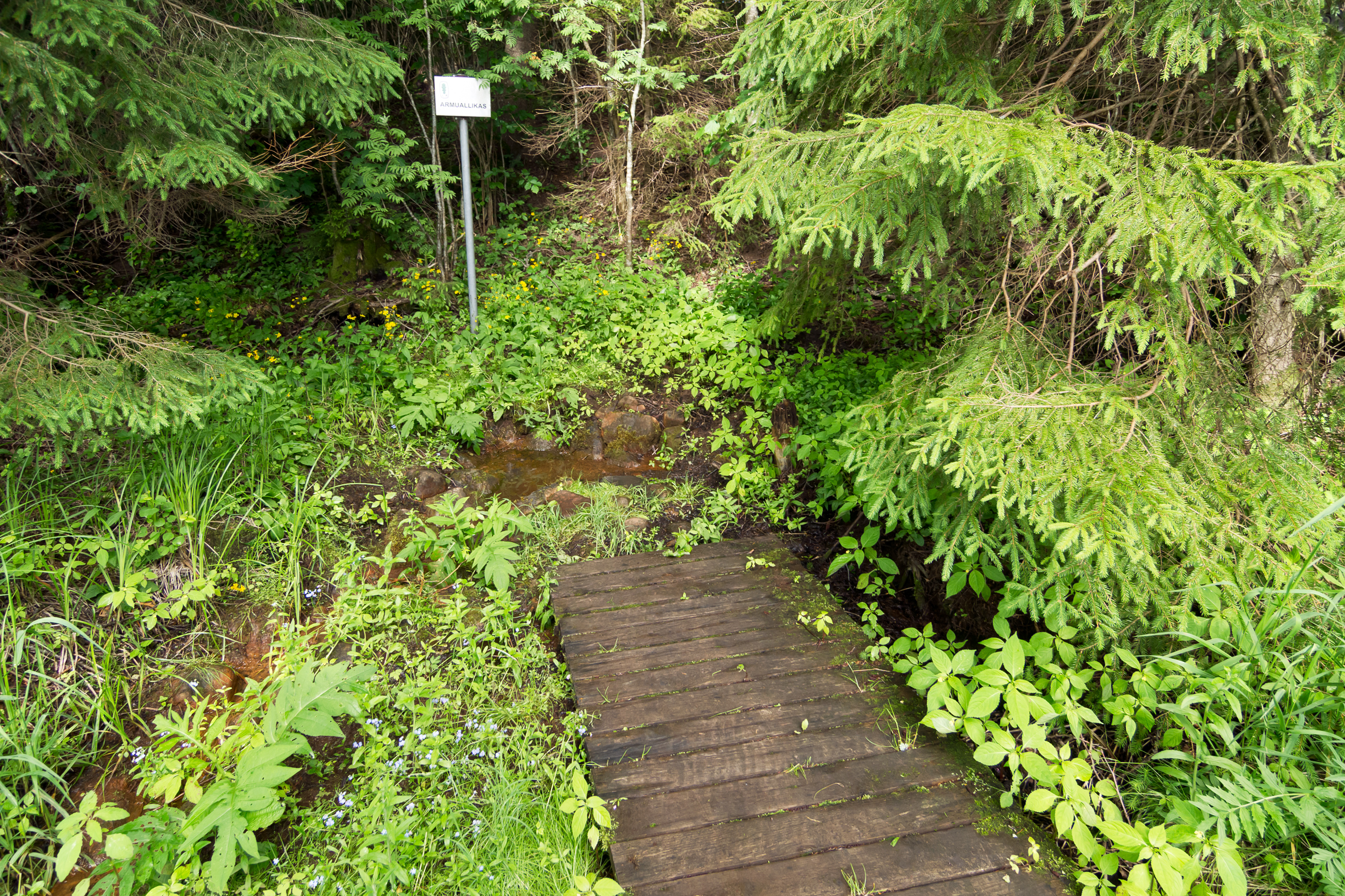 Armuallikas Pühajärve idakaldal